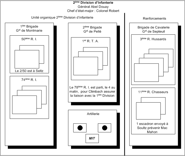 Organigramme de la Division Abel Douay le 4 août au matin. Organigramme personnel Licence GFDL